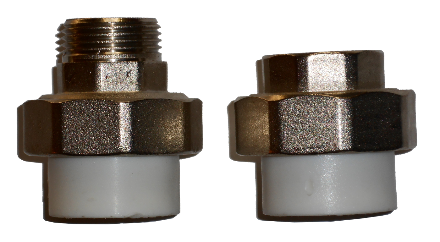 Две американки (папа+мама). Переход с полипропилена (PP-R диаметром 25 мм.) на металл. Фирма Kalde.